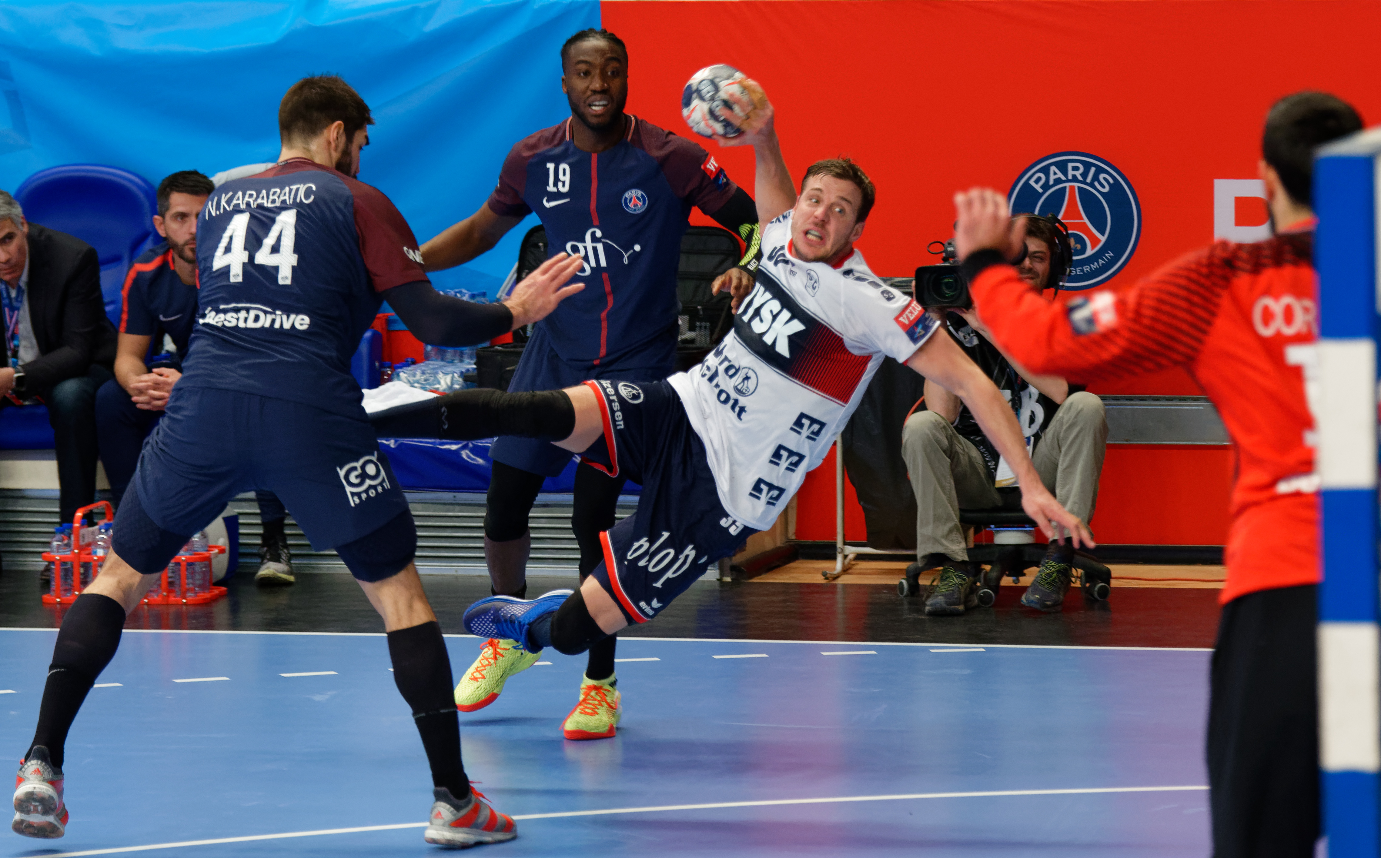 Rencontre de phase de groupe de la ligue des champions 2017/18 entre le PSG et SG Flensburg. A Coubertin, le 17 février 2018.